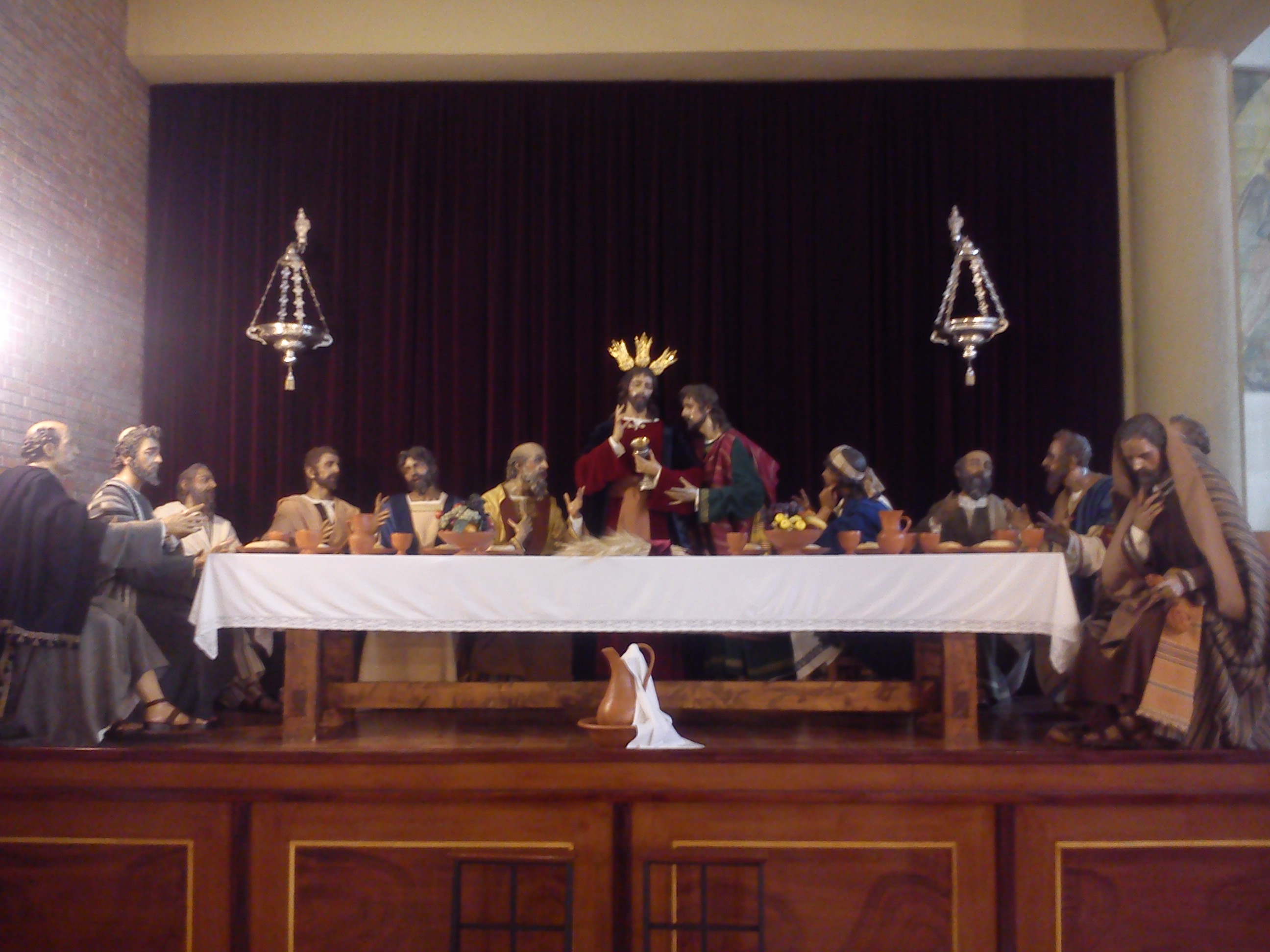 Jesús Salvador en su Santa Cena junto a los doce Apóstoles de Jaén en San Félix de Valois.